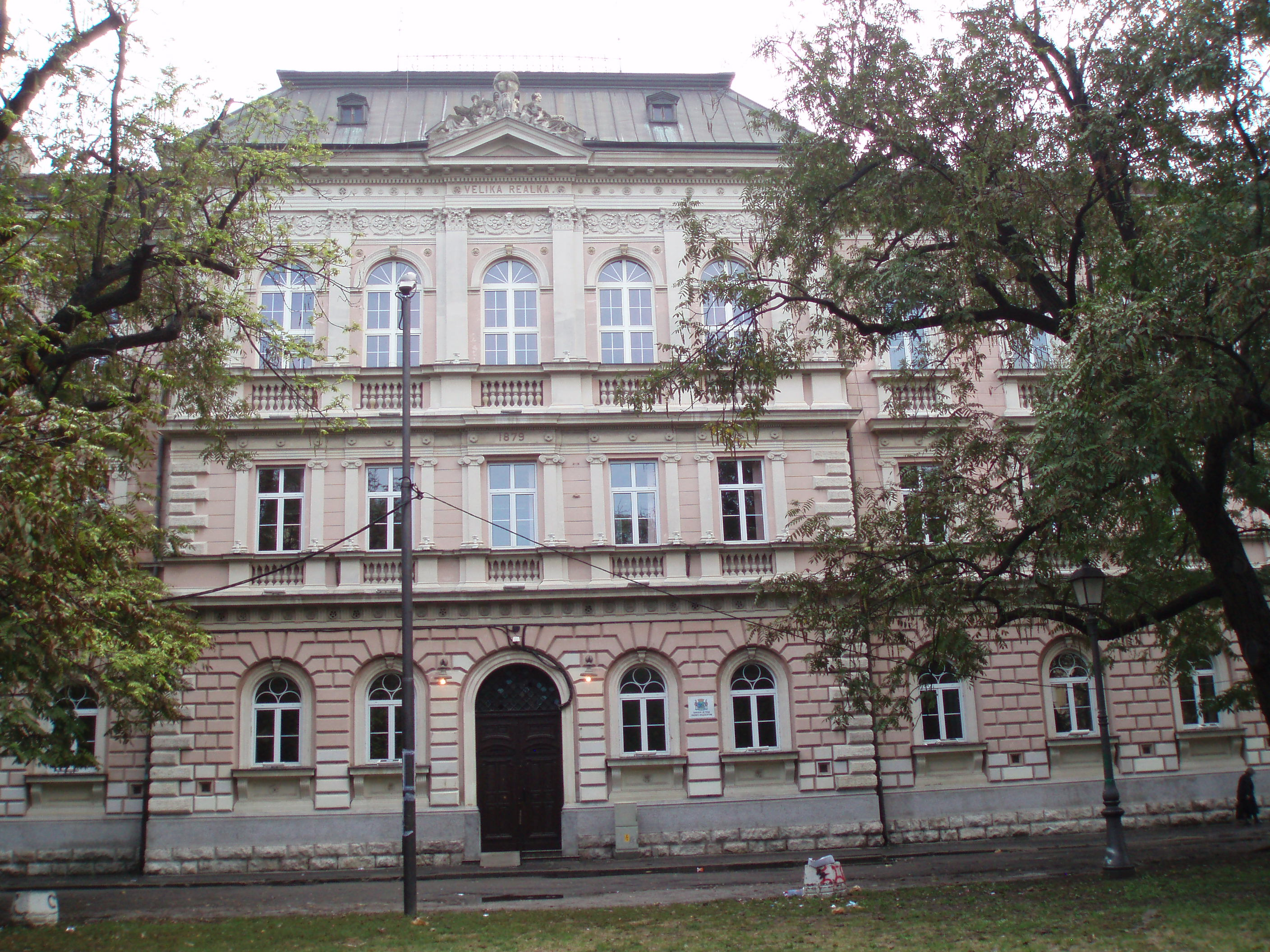 Zemunska Gimnazija glavni ulaz, Autor fotografije:Nicolo